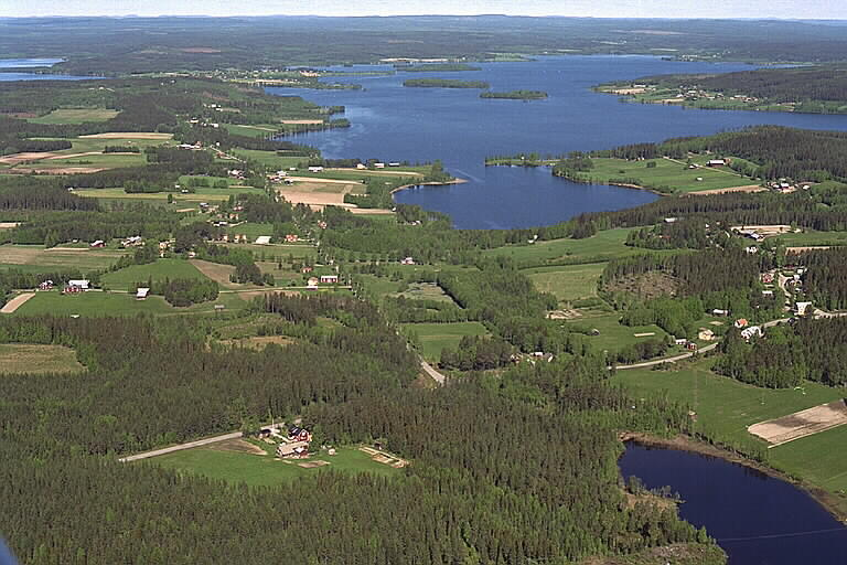 Bygdeträsk vid Göksjön. Motiv: Byarna runt Bygdeträsket och Göksjön Nyckelord: Flygbilder, Riksintressen Kategori: Miljöer, Odlingslandskap Bygdeträsk vid Göksjön.